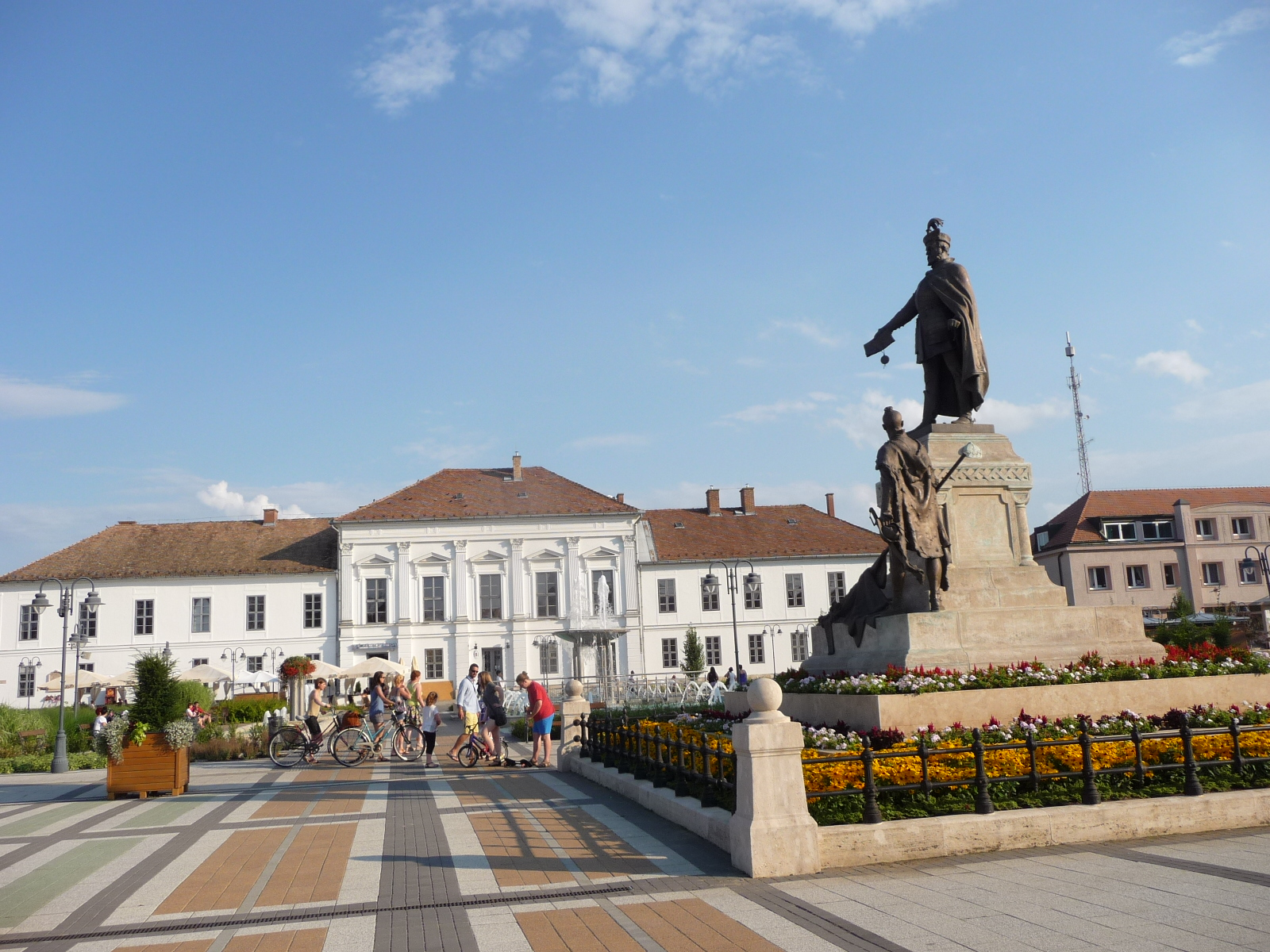 Bocskai István (1906., Holló Barnabás) Az erdélyi fejedelem Bocskai István átnyújtja híres kiváltságlevelét a hajdúság egészét jelképező hajdú vitéznek. A szobortalapzat mind a négy oldalának felső peremén a Bocskai-korona egy-egy domborműve látható. [1] - Hajdúböszörmény (Hajdú-Bihar megye), Bocskai tér